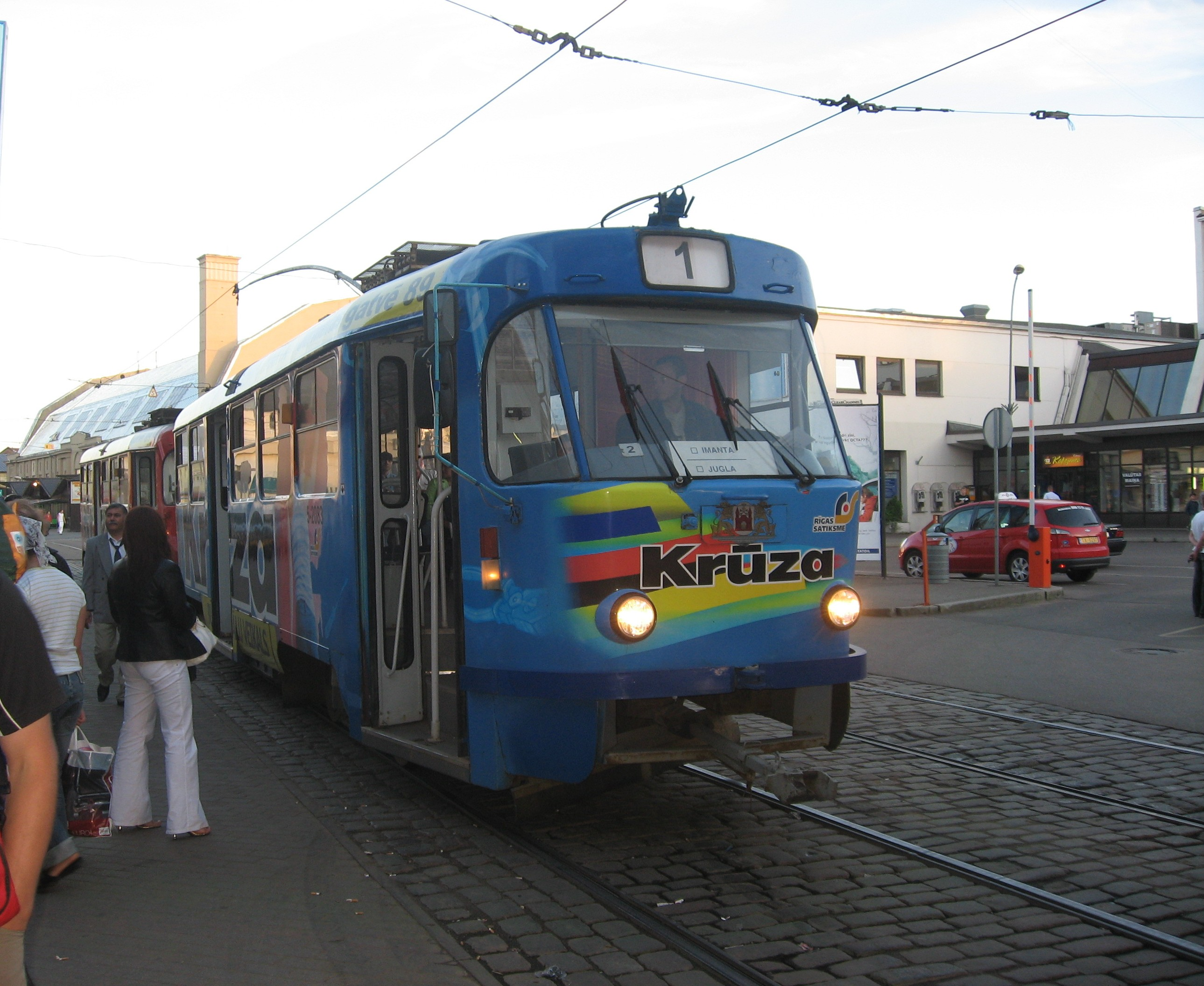 Tramvaj v Rize